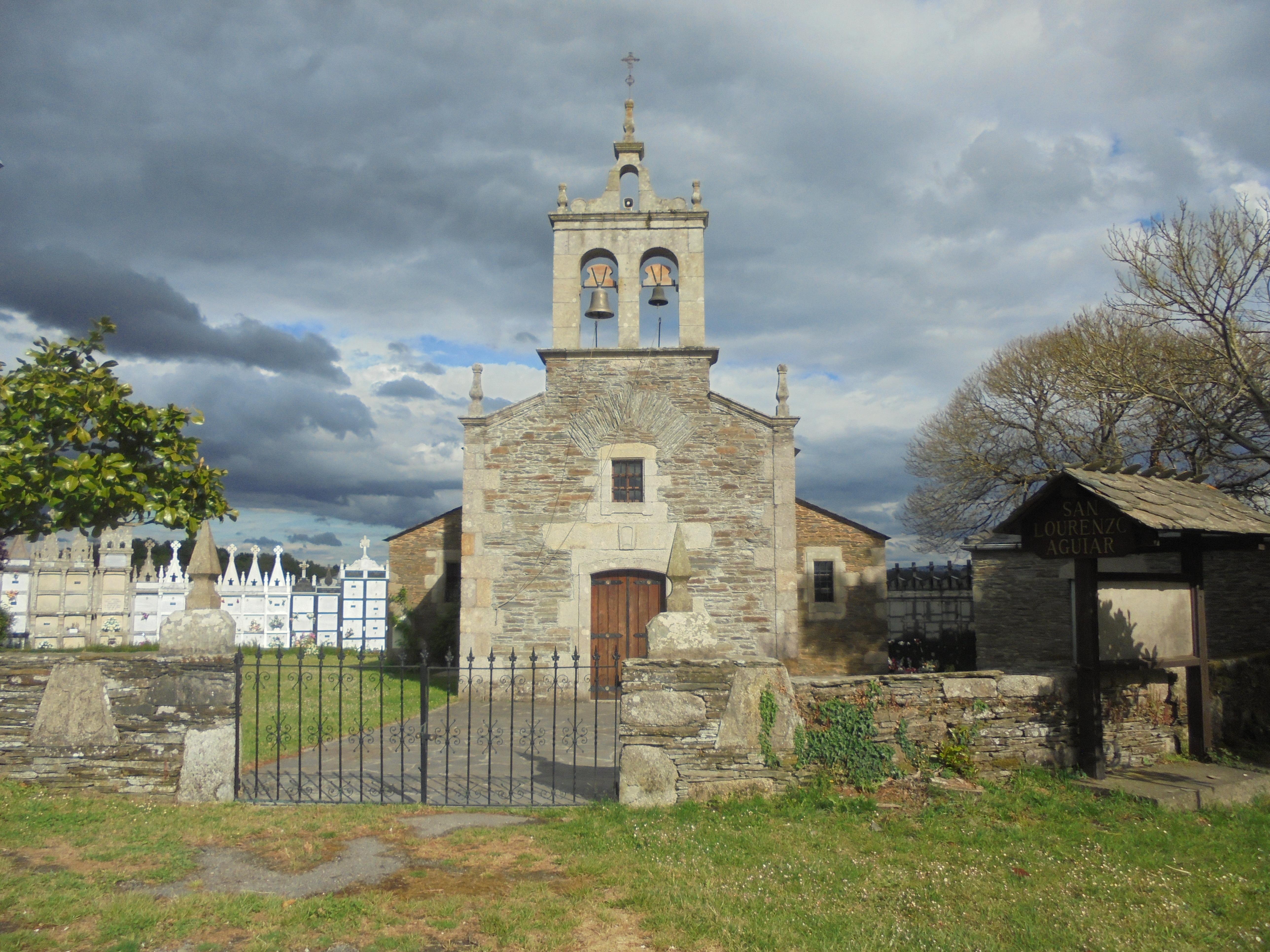 Igrexa parroquial de San Lourenzo de Aguiar ( Outeiro de Rei)